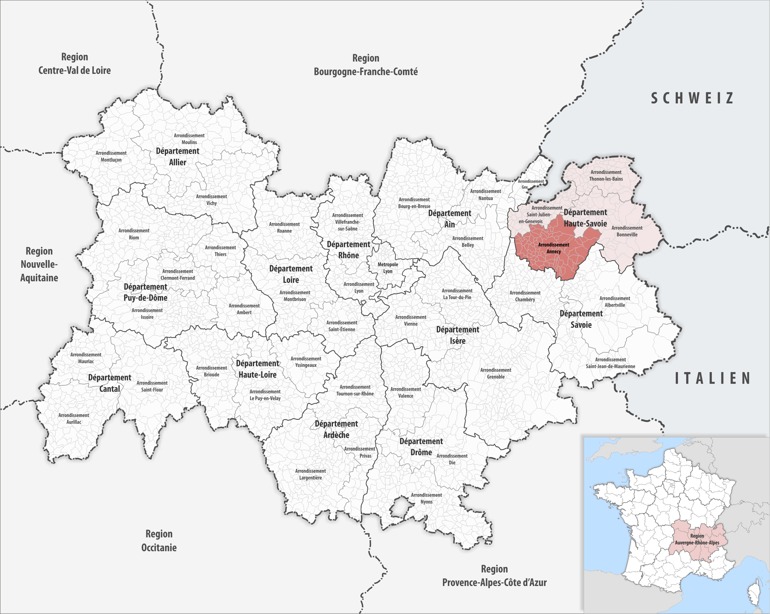 Lage des Arrondissements Annecy